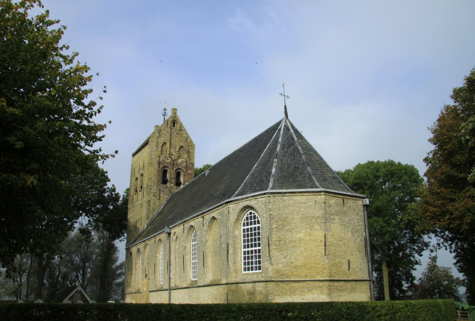 Lytsewierrum Gertrudiskerk